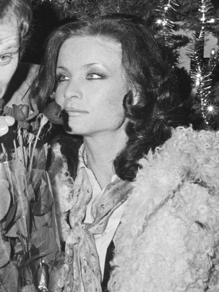 Kate O'Mara op Schiphol (speelt Jane Maxwell uit The Hammonds)